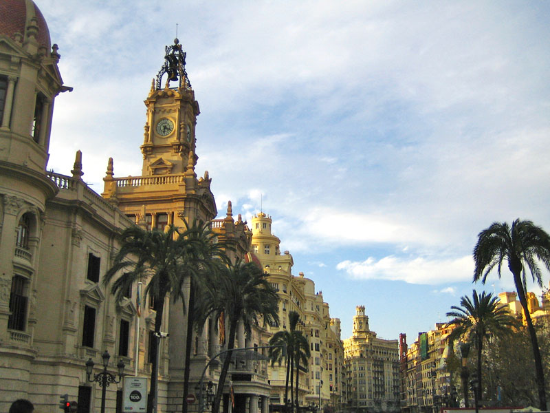 Plaça de l'ajuntament de València, (Horta), País Valencià. Plaza del Ayuntamiento de Valencia, Comunidad Valenciana. Valencia town hall square, Valencia, Spain.